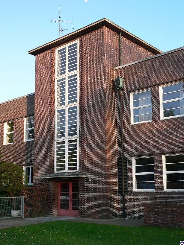 Treppenhaus Walddörfer-Gymnasium Im Allhorn 49 in Hamburg Volksdorf (16.4.2005) Architekt: Fritz SchumacherThis is a photograph of an architectural monument.